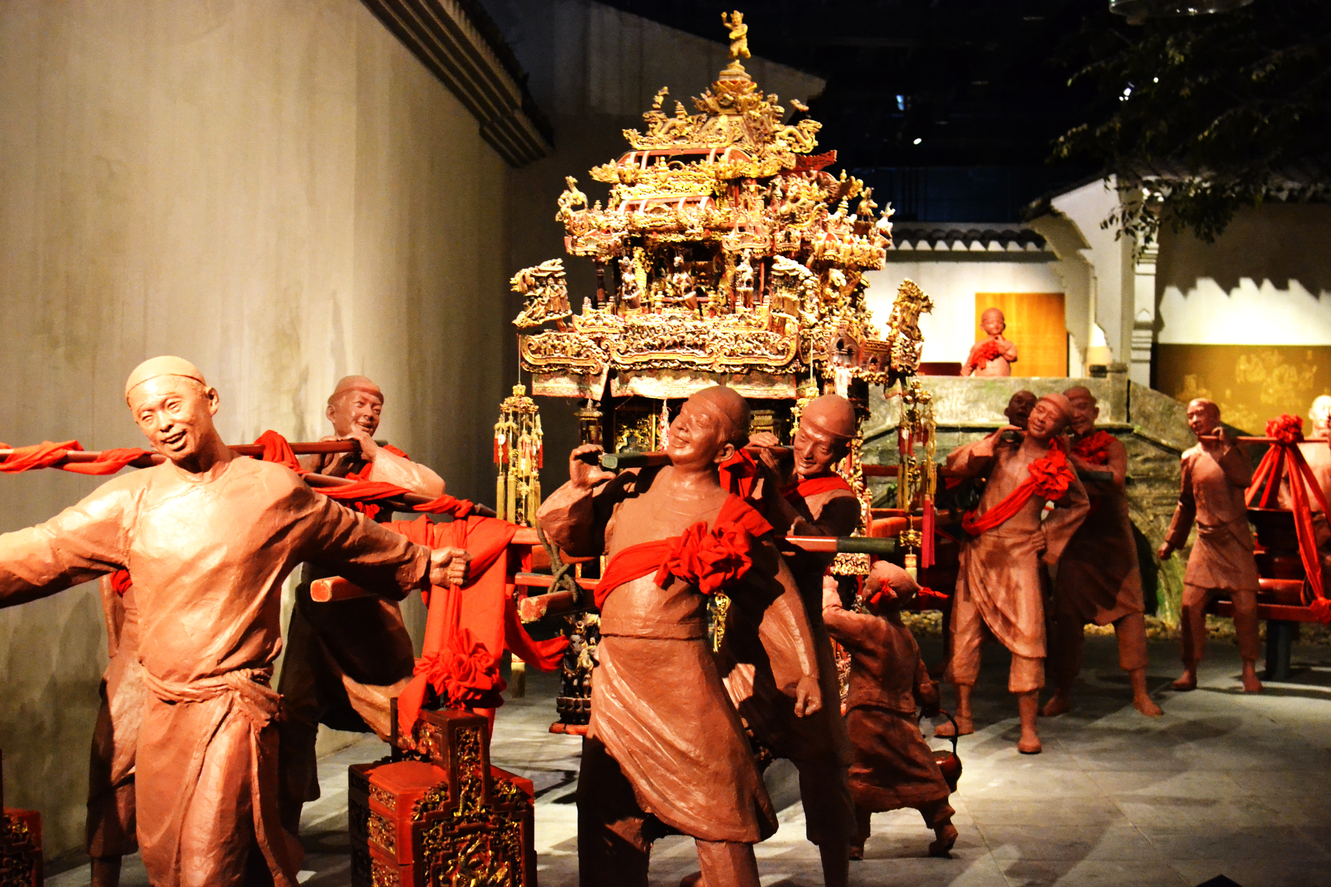 宁波博物馆展出的“十里红妆”婚俗雕塑